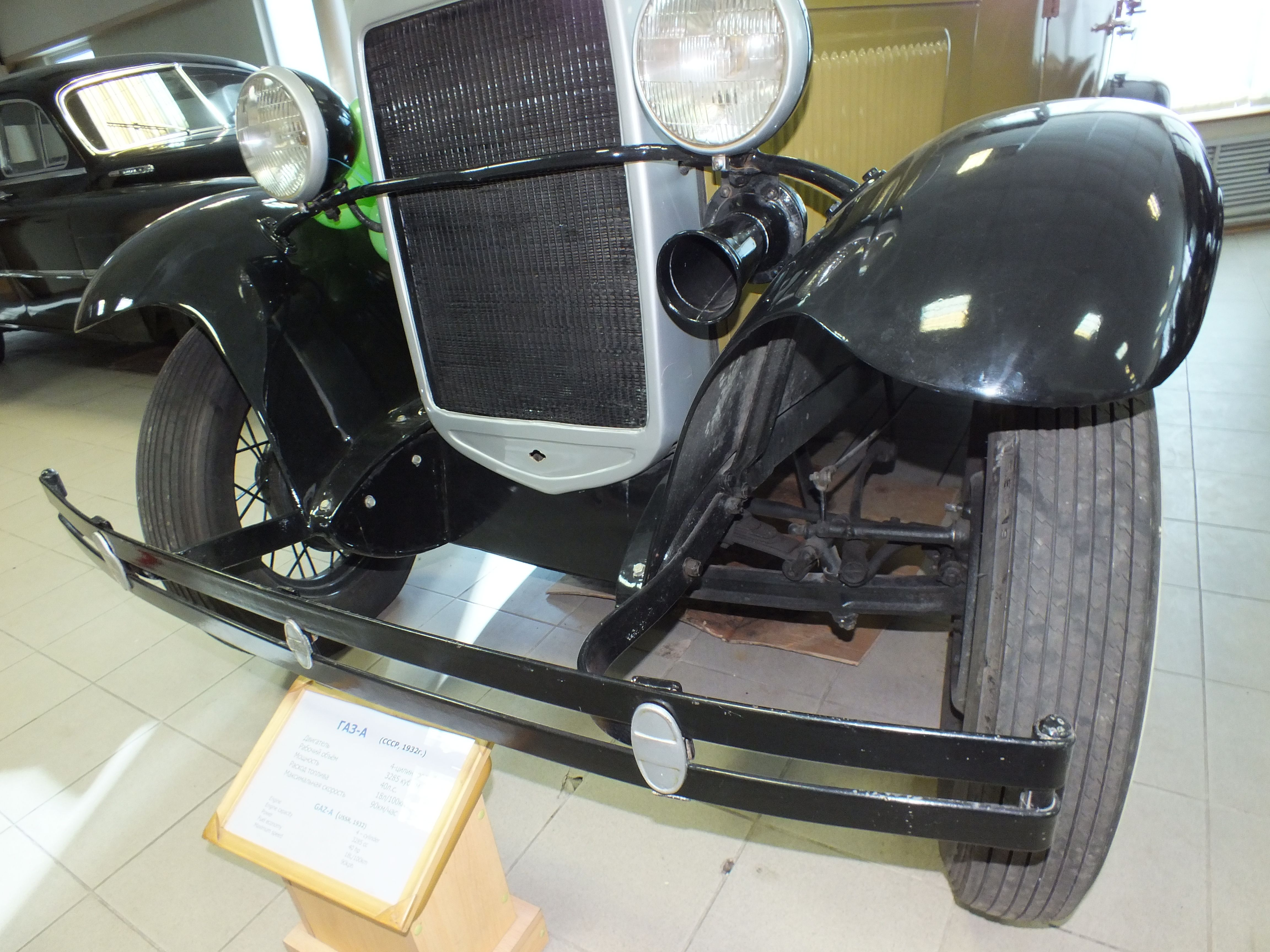 ГАЗ-А во Владивостоке